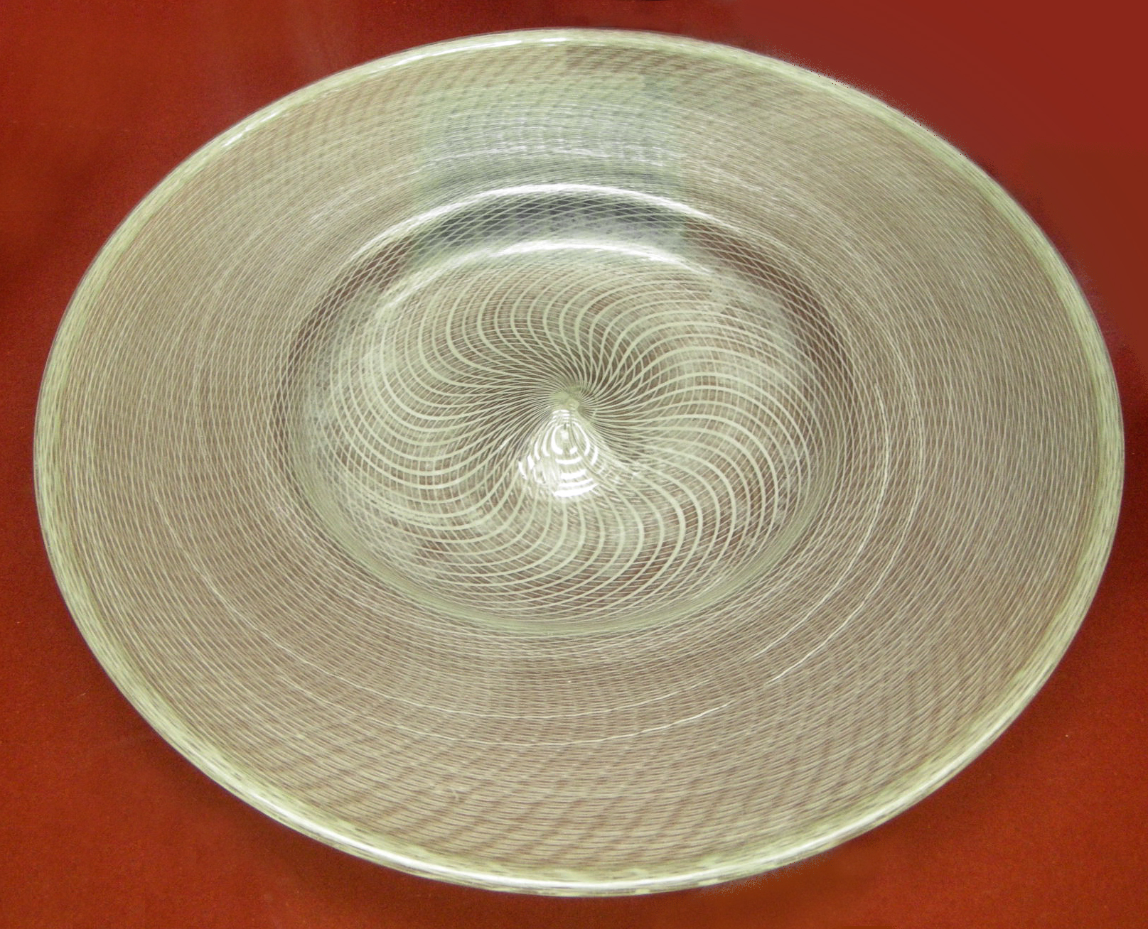 Piatto in vetro filigrano a reticello una delle tecniche decorative inventate dagli artigiani muranesi nel Cinquecento. Museo medievale, Bologna, Italia.